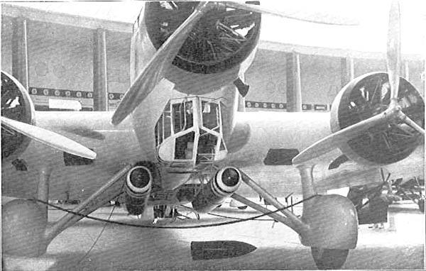 Aereo Savoia Marchetti SM.81 aerosilurante